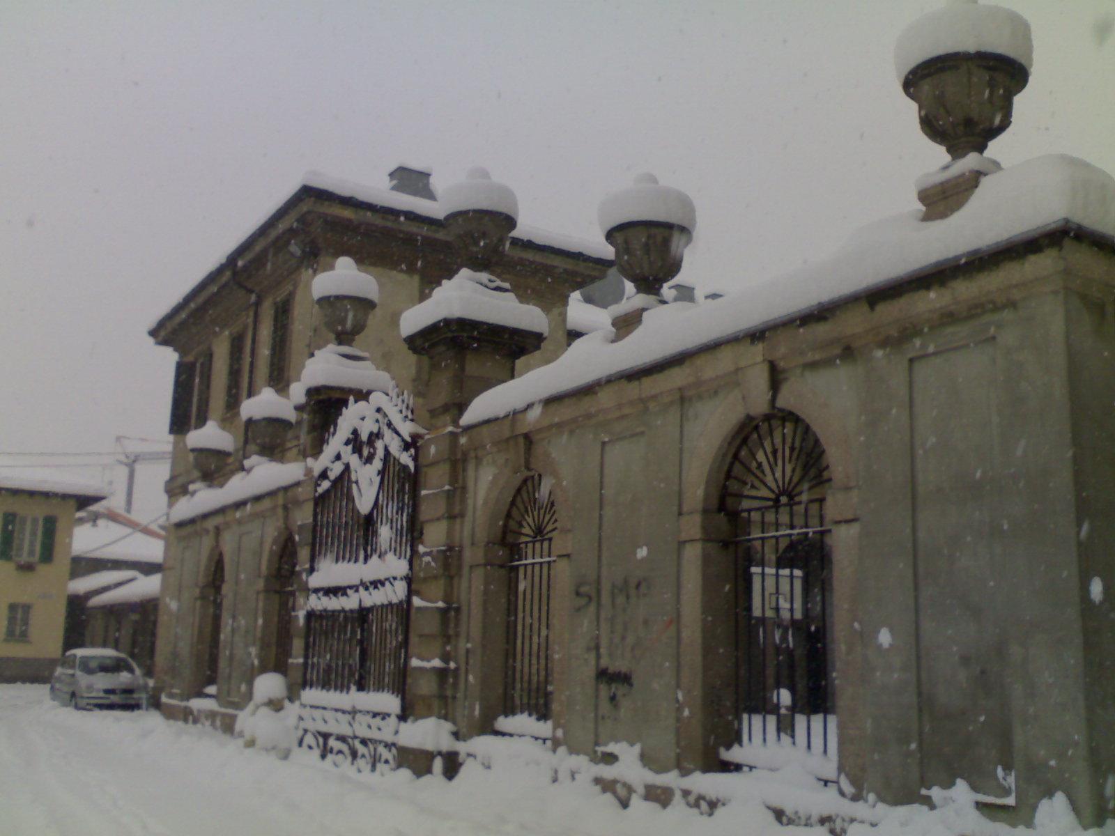 Cancello del Palazzo Celesia a Rivolta d'Adda(Cr), oggi oratorio. Foto scattata da me.